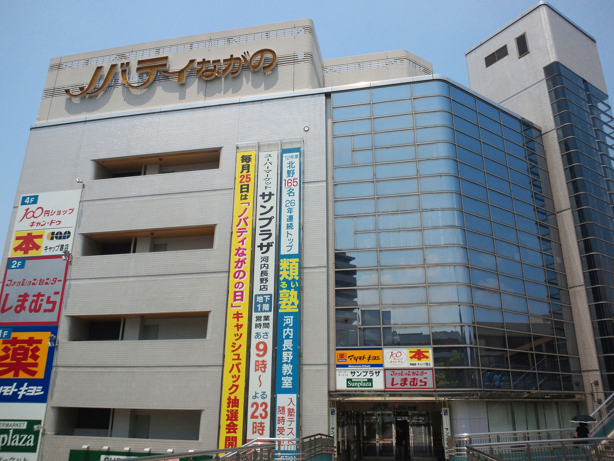 ノバティながの北館